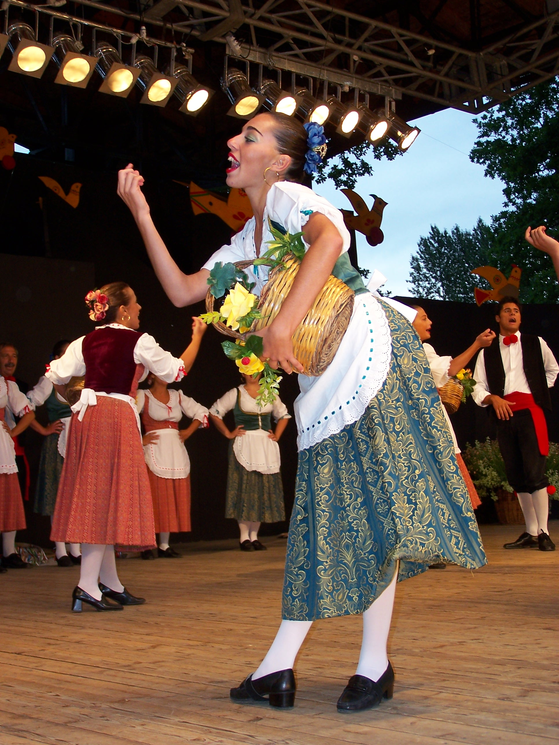 Występ zespołu Antiche Tradizioni Popolari z Agrigento (Sycylia) podczas 43. Tygodnia Kultury Beskidzkiej w Żywcu.